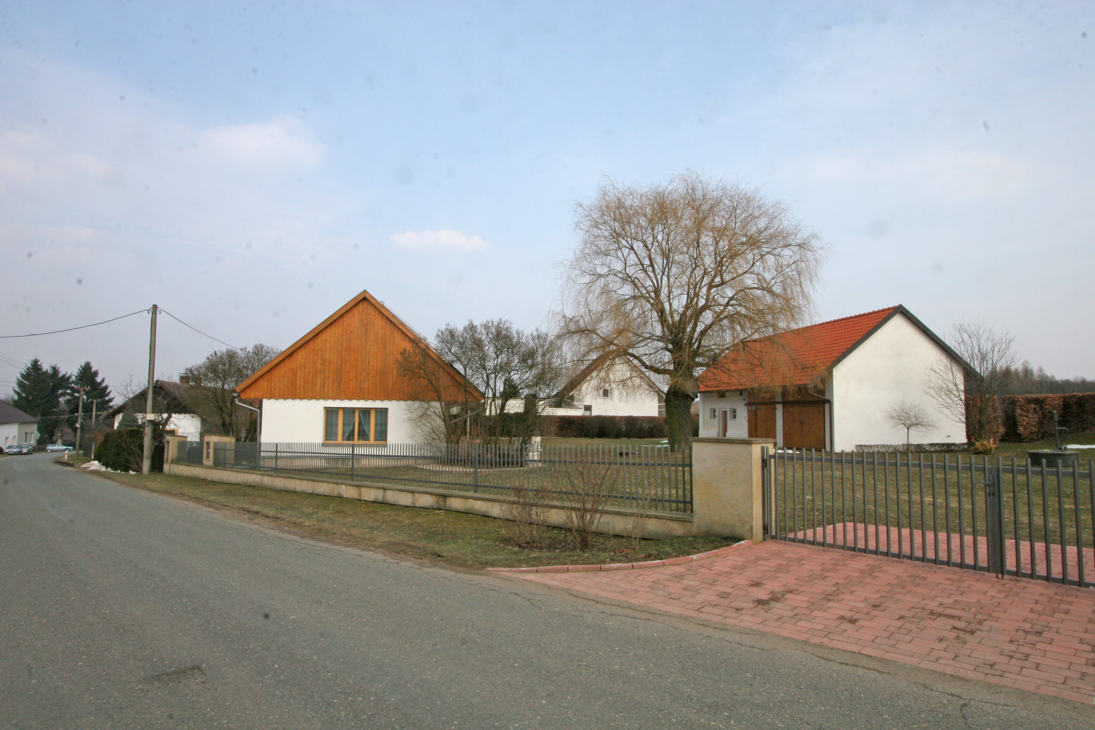 Stračovská Lhota - Zavadilka čp. 45